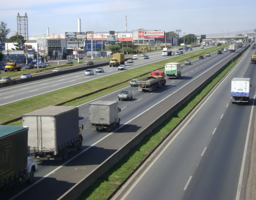 Rodovia Raposo Tavares, na Zona Sul de Presidente Prudente